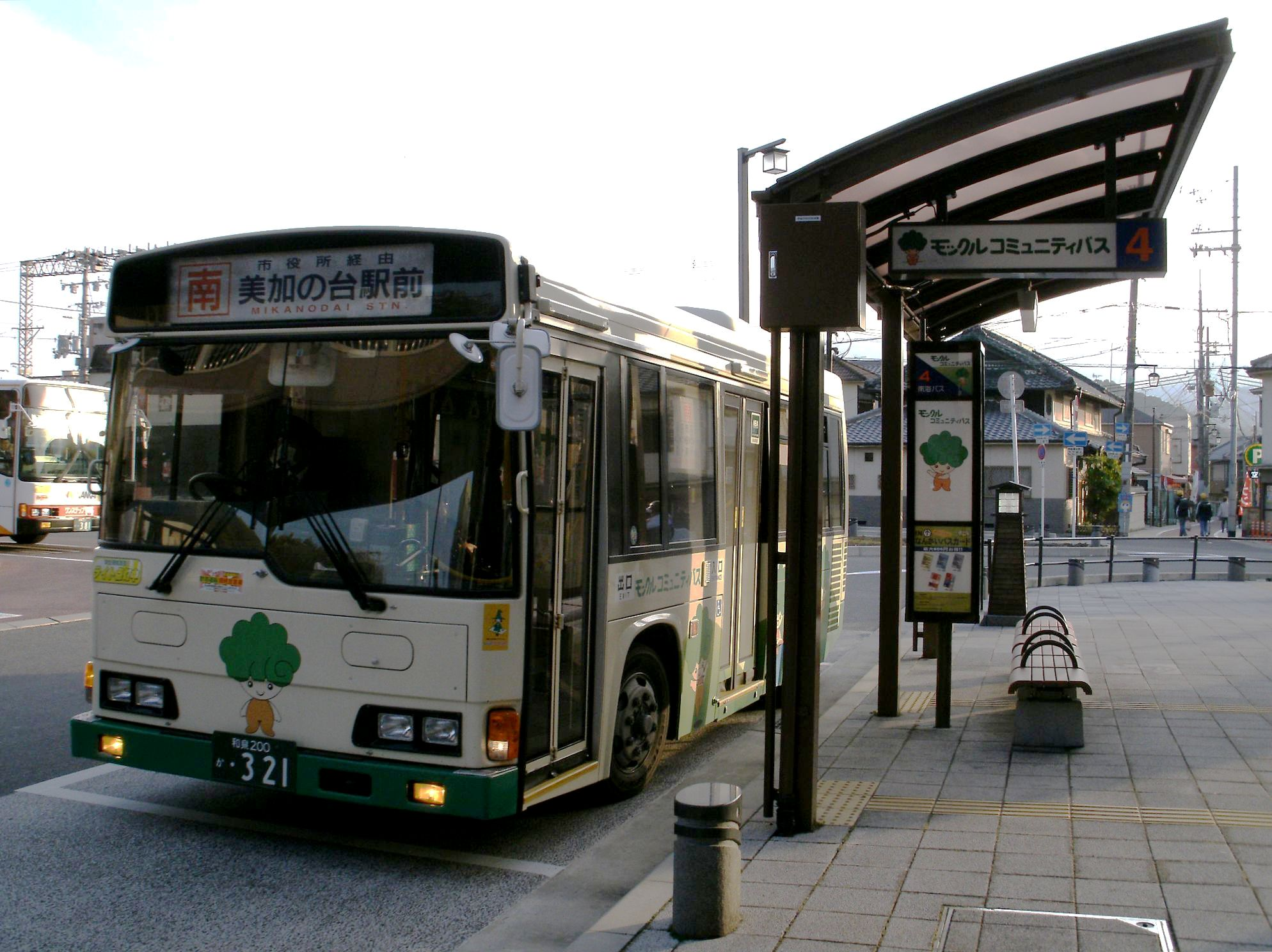 モックルコミュニティバス 三日市町駅前にて